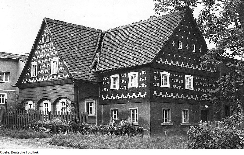 Original image description from the Deutsche Fotothek Schönbach-Neudorf. Ehem. Windmühlenhaus (Nr. 322)